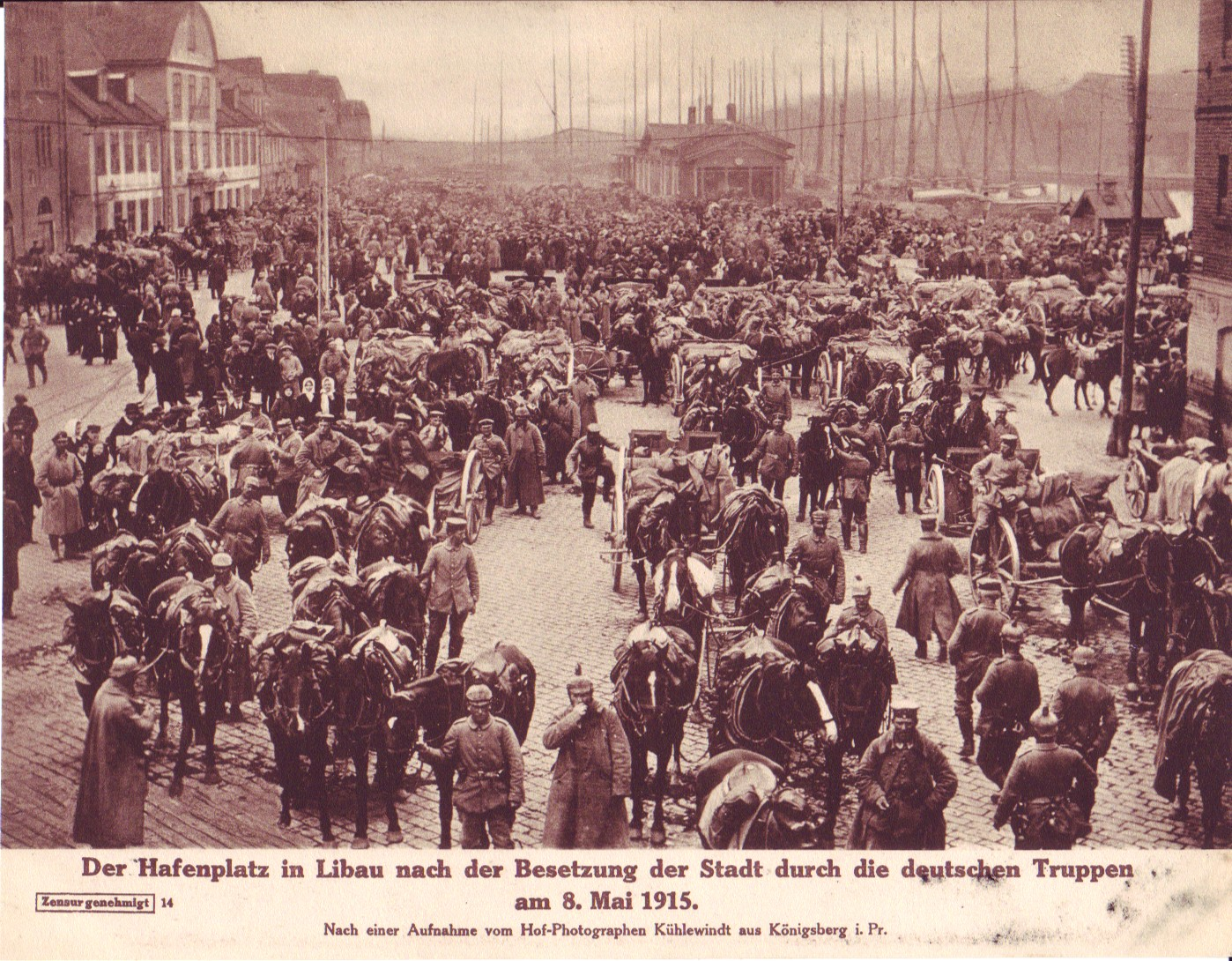 POstkarte